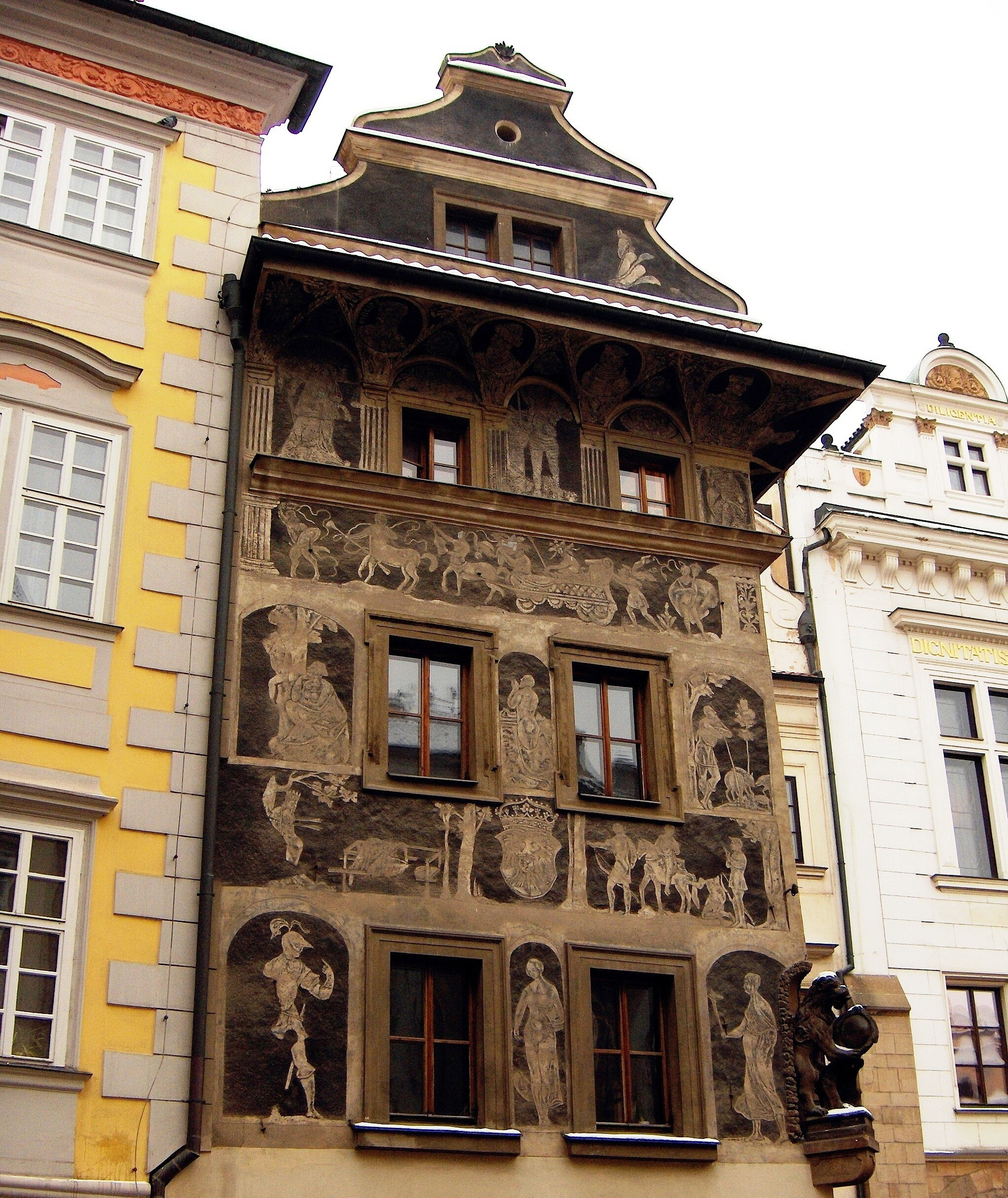 Kafka's Residence (1889-1896) - La famille Kafka habitait au numéro 27 de la rue Dušní.